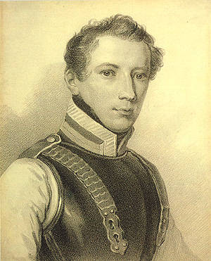 Соколов Петр Федорович. Портрет А.М. Муравьева. 1822 г.